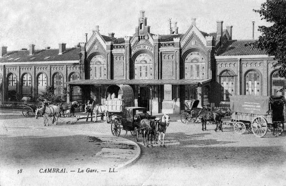 L'ancienne gare de Cambrai vers 1900, devenue la gare de Cambrai-Annexe fermée aux voyageurs et ouverte au fret.